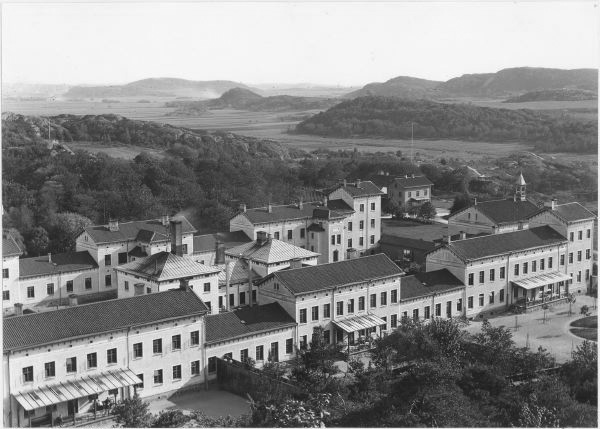 Sankt Jörgens sjukhus, Backa, Göteborg